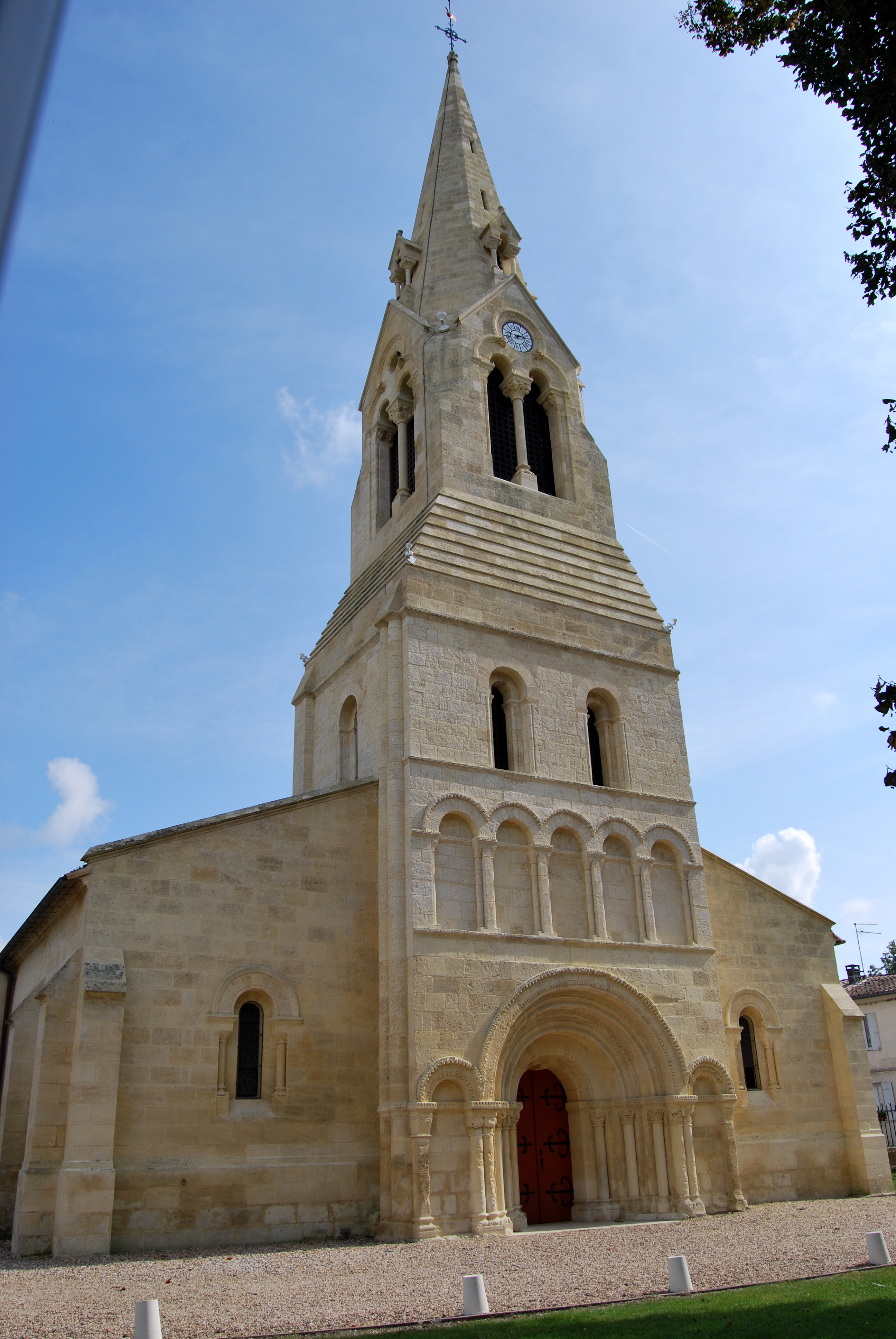 Église Saint-Martin d'Izon .